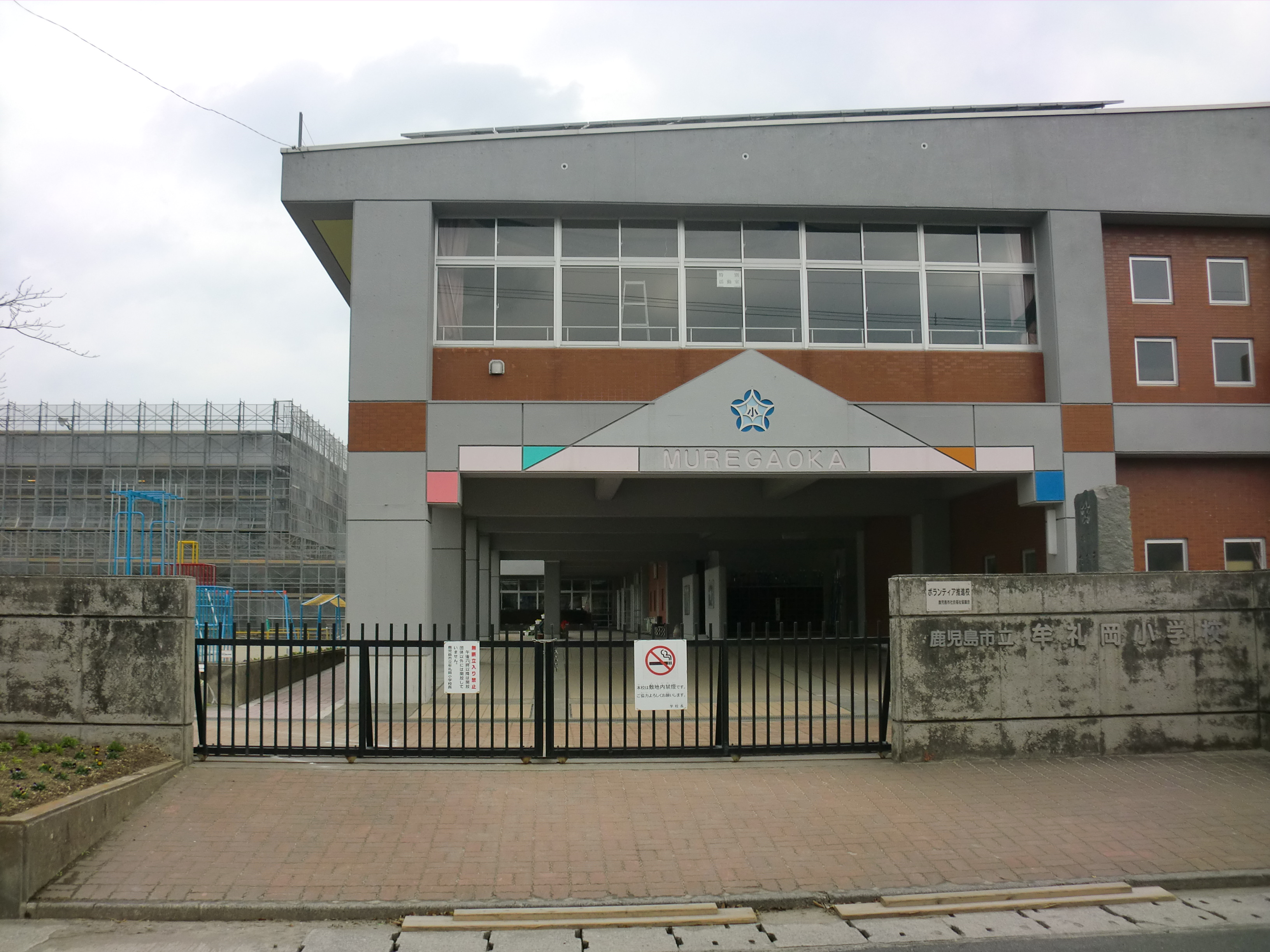 鹿児島市にある牟礼岡（むれがおか）小学校